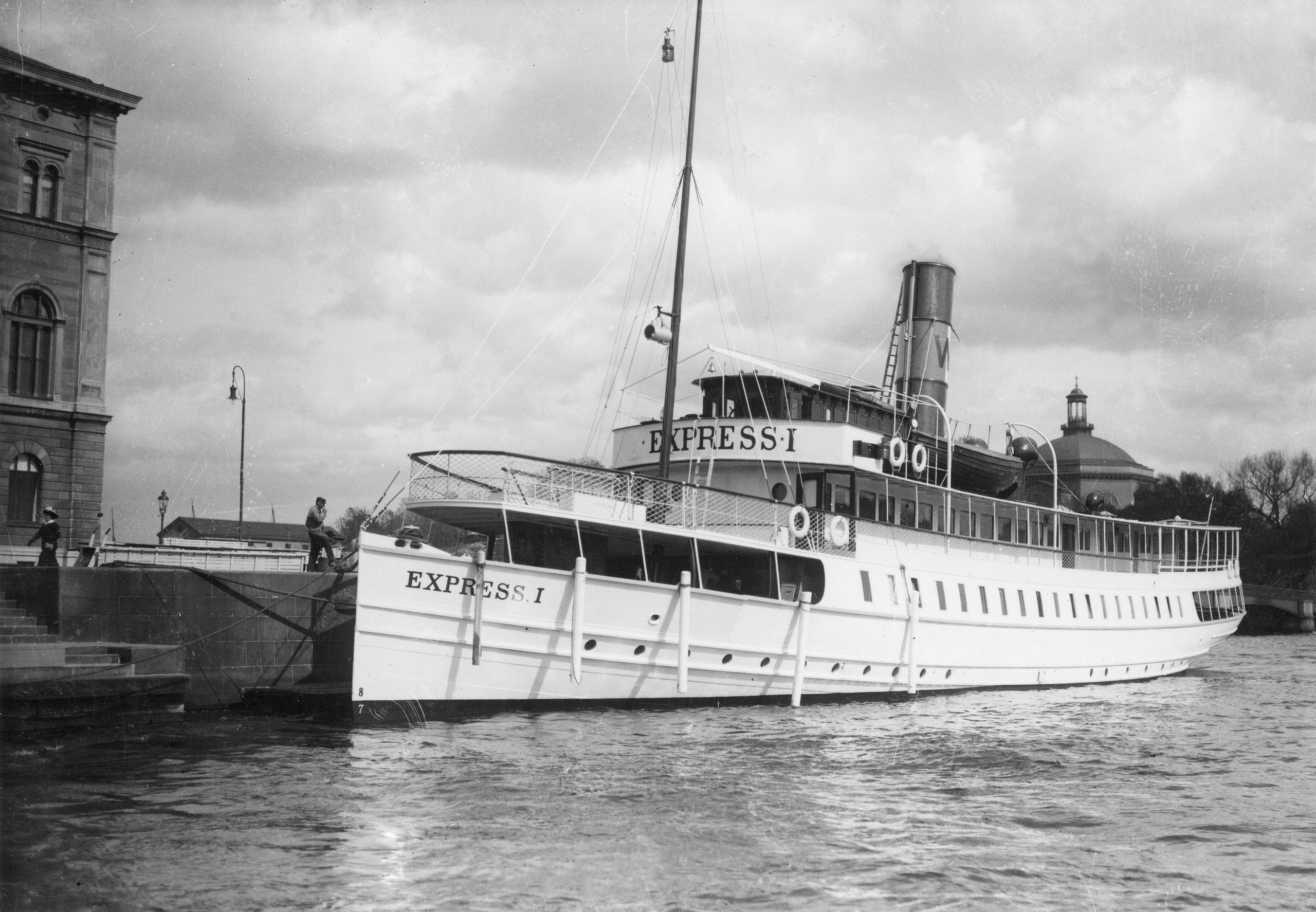 S/S Express I liggandes vid kaj vid Nationalmuseum i Stockholm